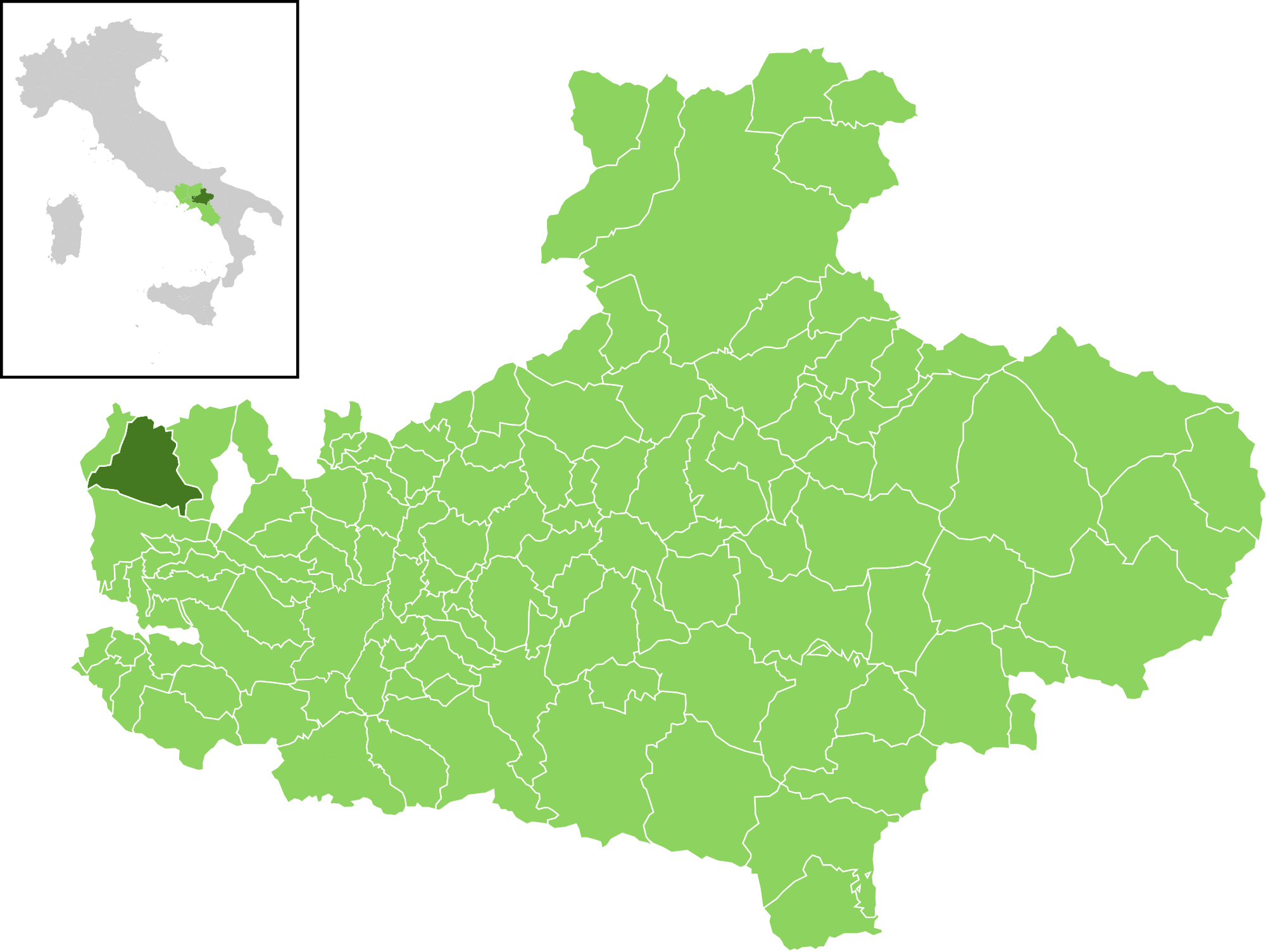 Il comune all'interno della provincia di Avellino